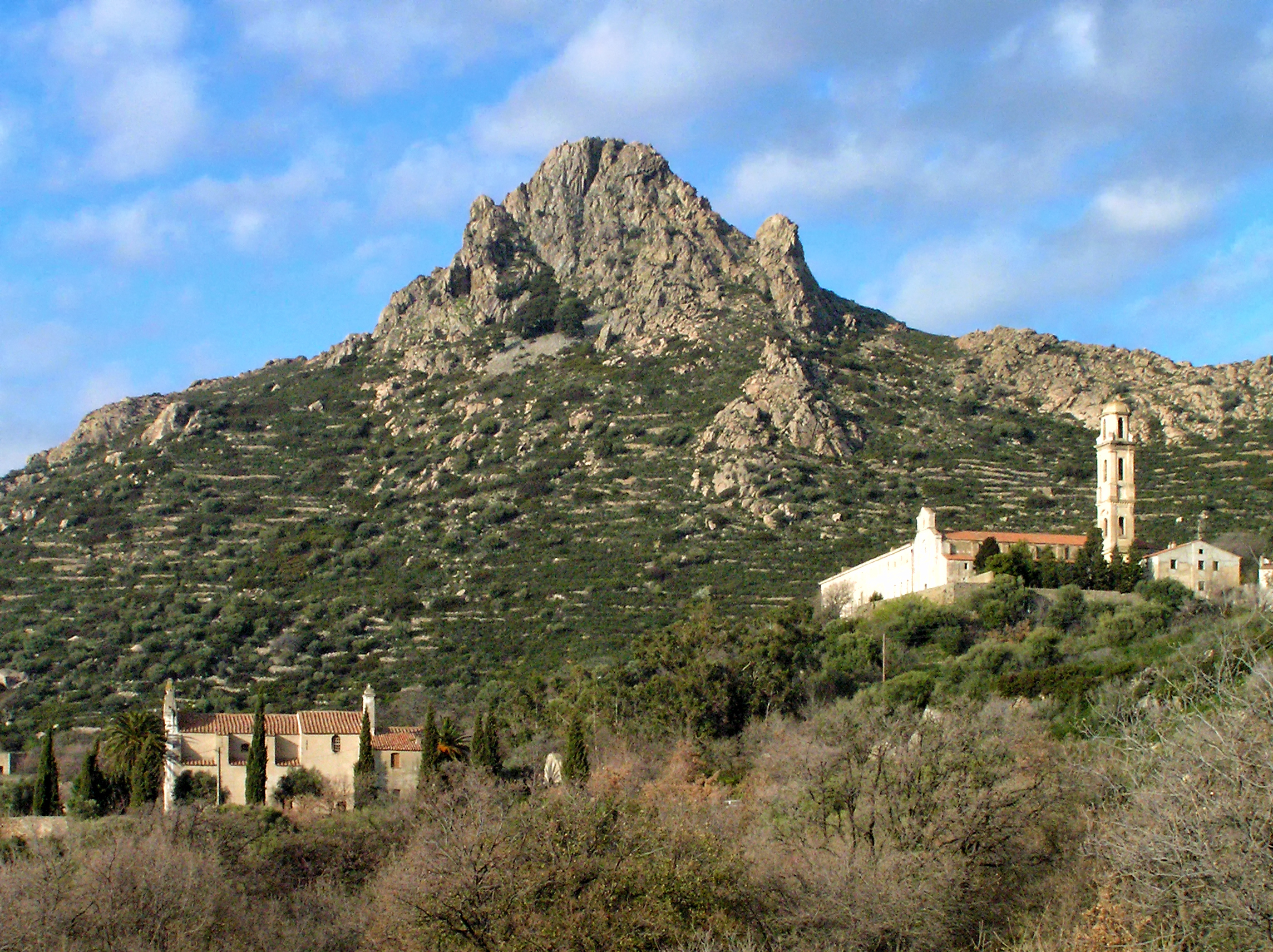 Corbara, Balagne (Corse) - Monte Sant'Angelo (562 m) vu du verant méridional. À l'arrière du sommet, sont les vestiges du castrum Sant' Angelo. À l'avant, le sanctuaire Notre-Dame de Lazio et le couvent de Corbara.